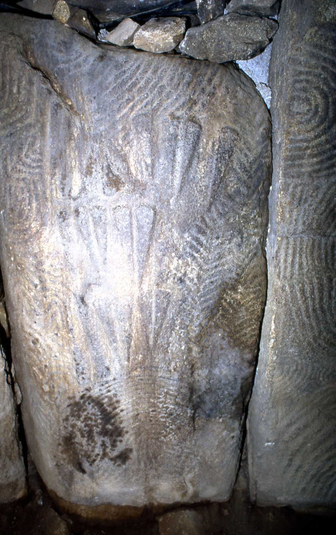 Gavrinis1